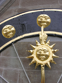 Quelle: Dr. Walter E. Strahm Fotograf/Zeichner: Dr. Walter E. Strahm Ort: Zürich-CH/S. Teotónio-PT Datum/Zeit: 15.06.2005 – 09:00 Beschreibung: Graphische Darstellung der *Fraumünsteruhr als Einzeigerversion.